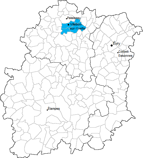 Carte de l'Essonne et des communes composant le canton de Villebon-sur-Yvette